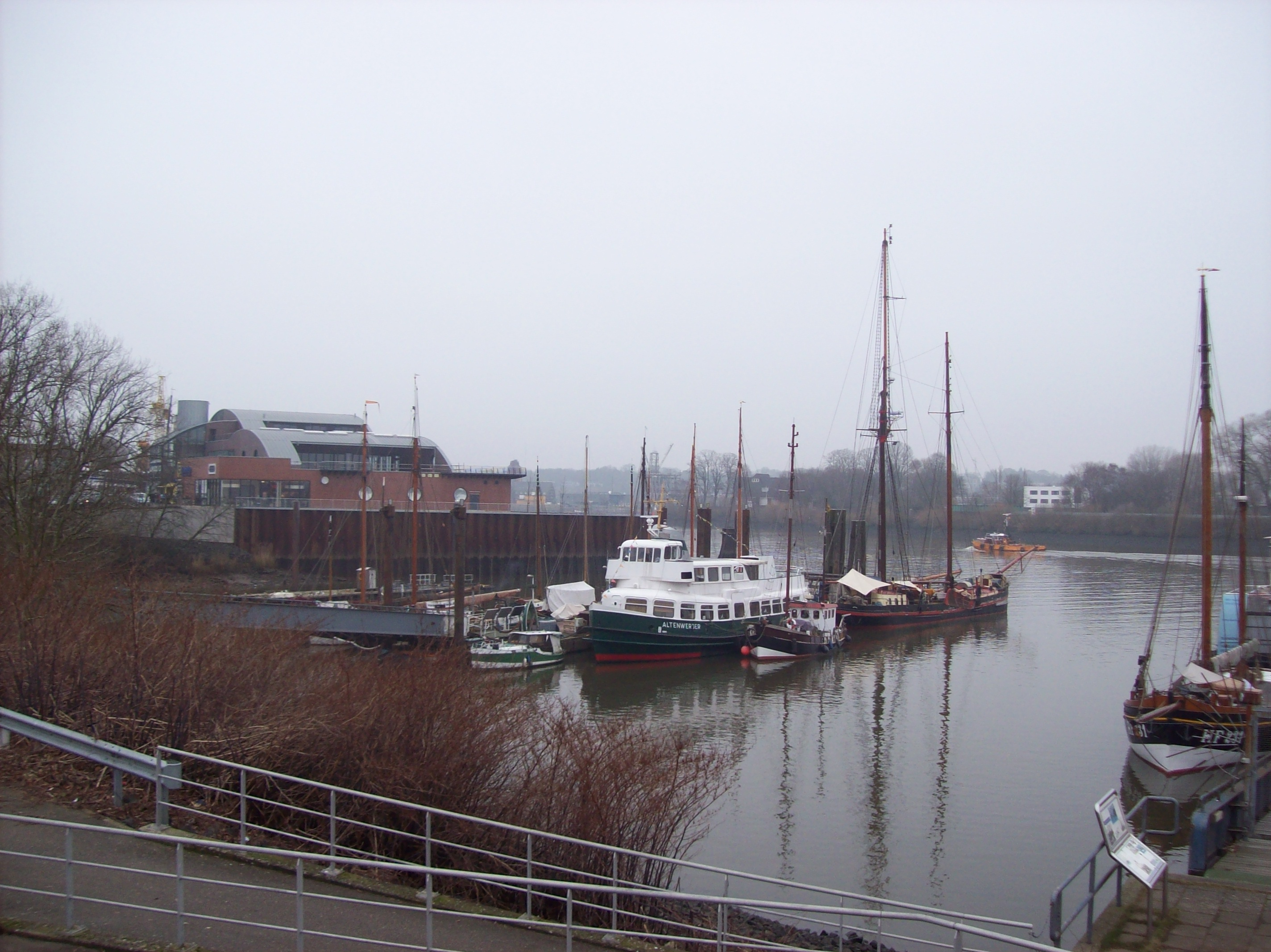 Der kleine Kutterhafen am Köhlfleet Hauptdeich.